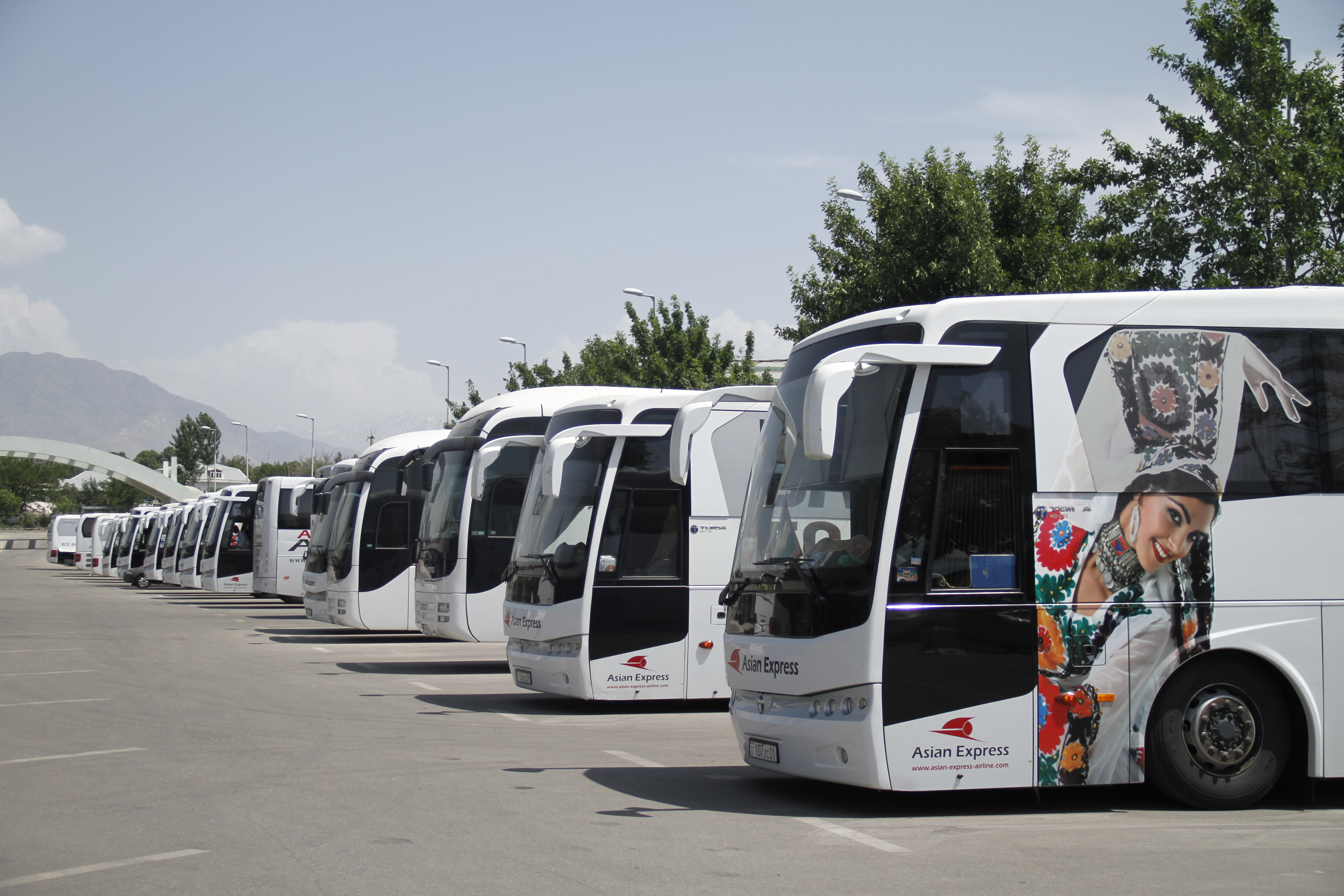 Тоҷикӣ: Азия Экспресс Терминал (Автовокзал)